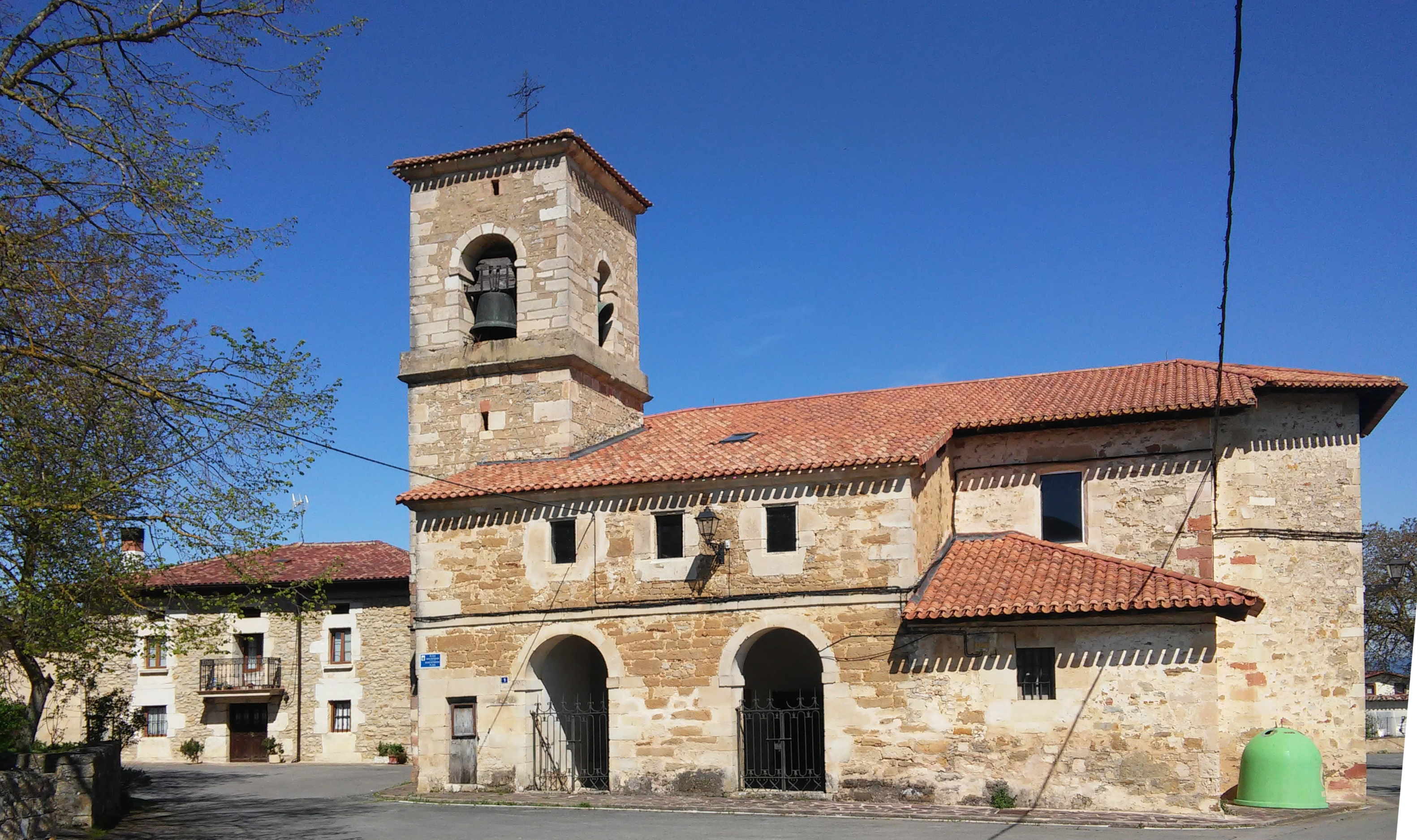 Ixonako eliza (Arabako Lautada)